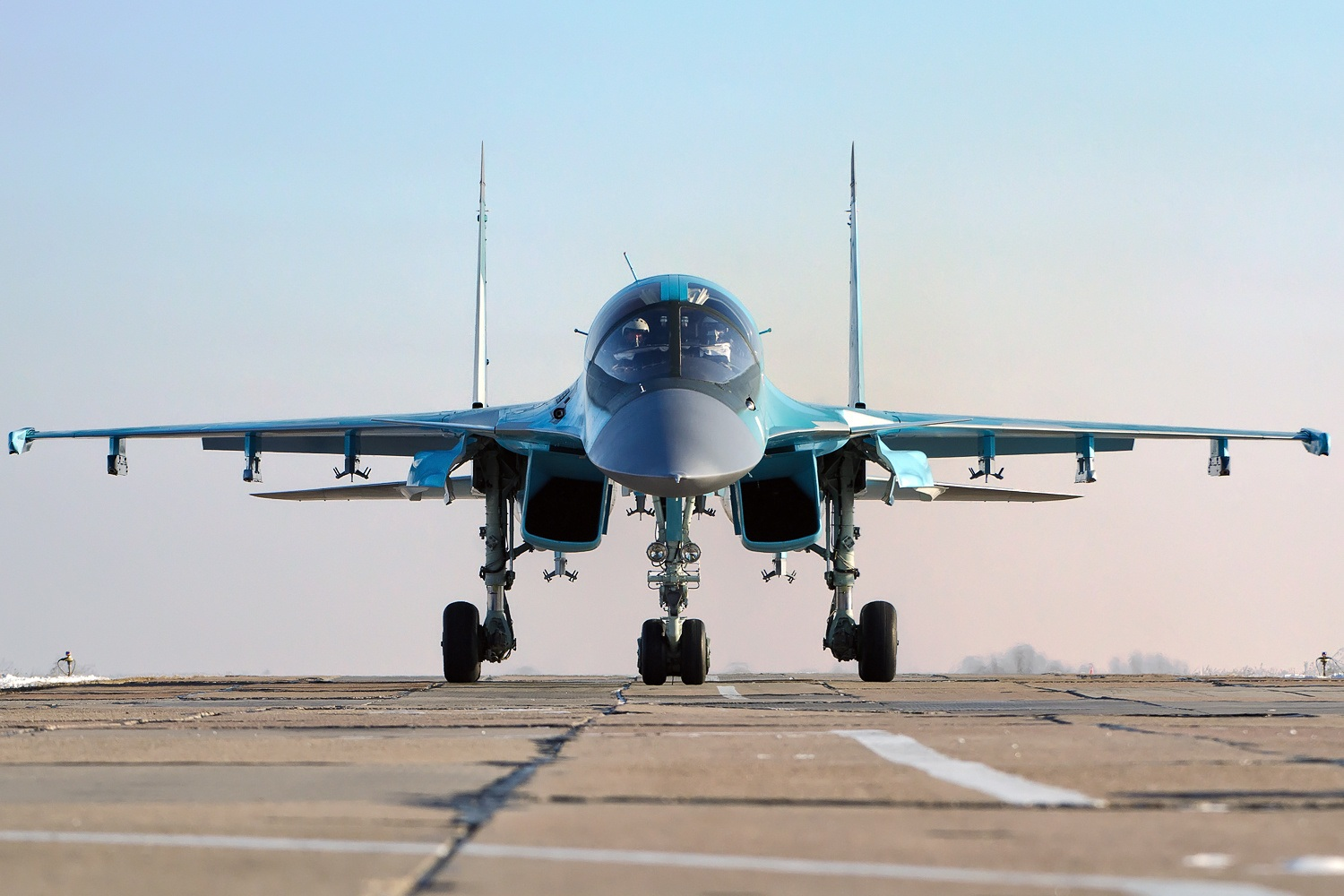 Sukhoi Su-34 01 RED Russia, January 2012